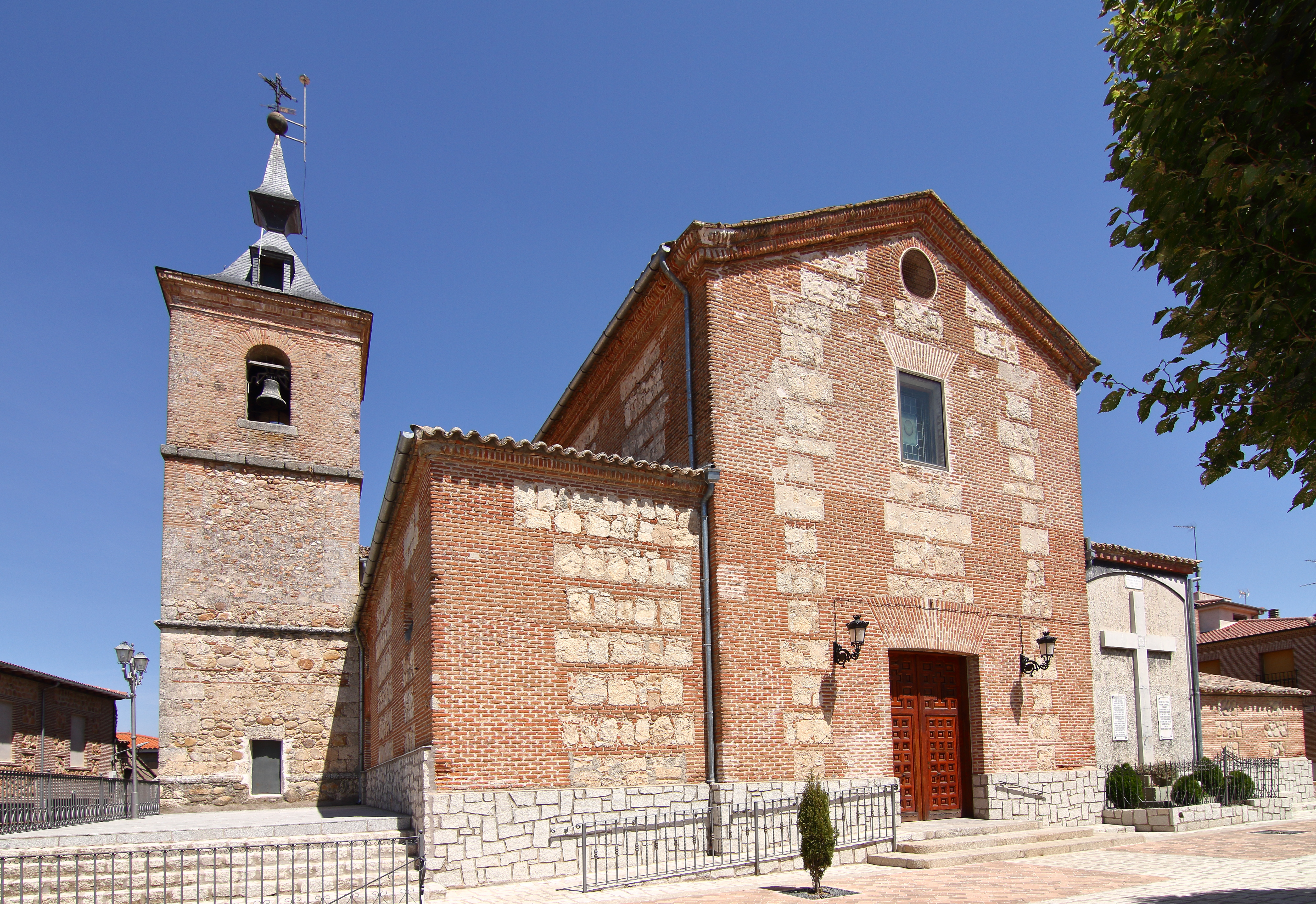 Santa Cruz del Retamar, Iglesia parroquial, fachada principal